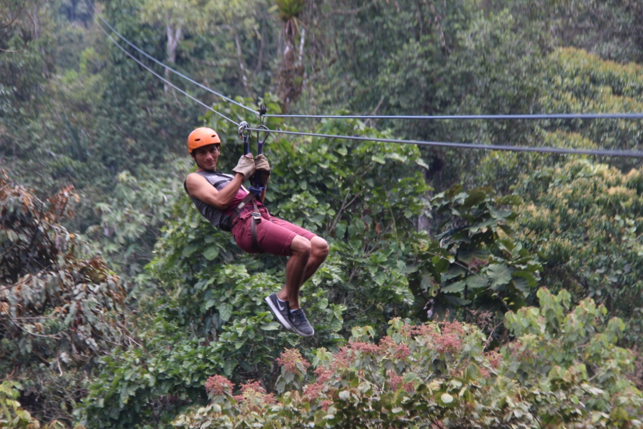 TOUR DE CANOPY